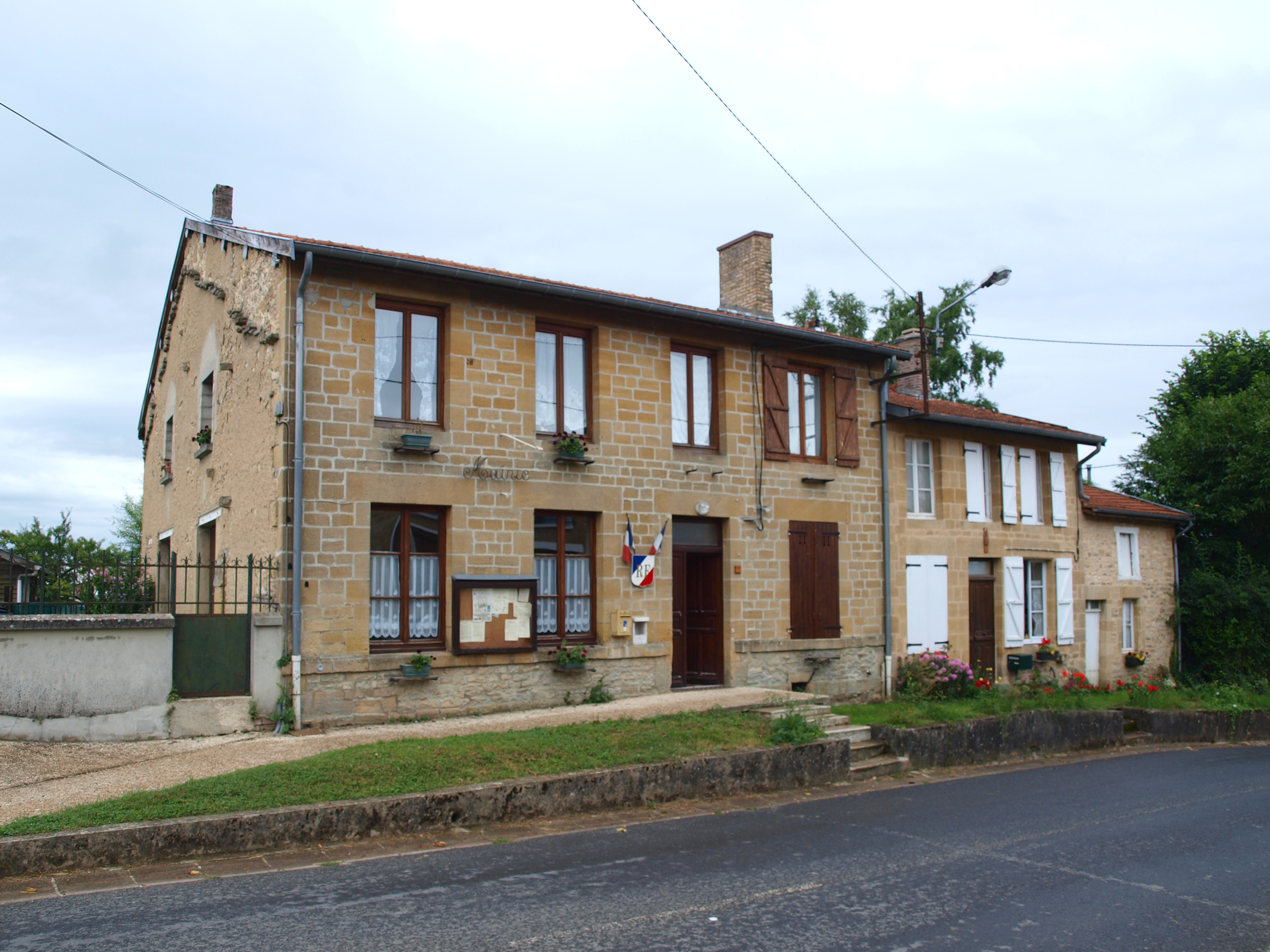 Briquenay (Ardennes, France) ; mairie